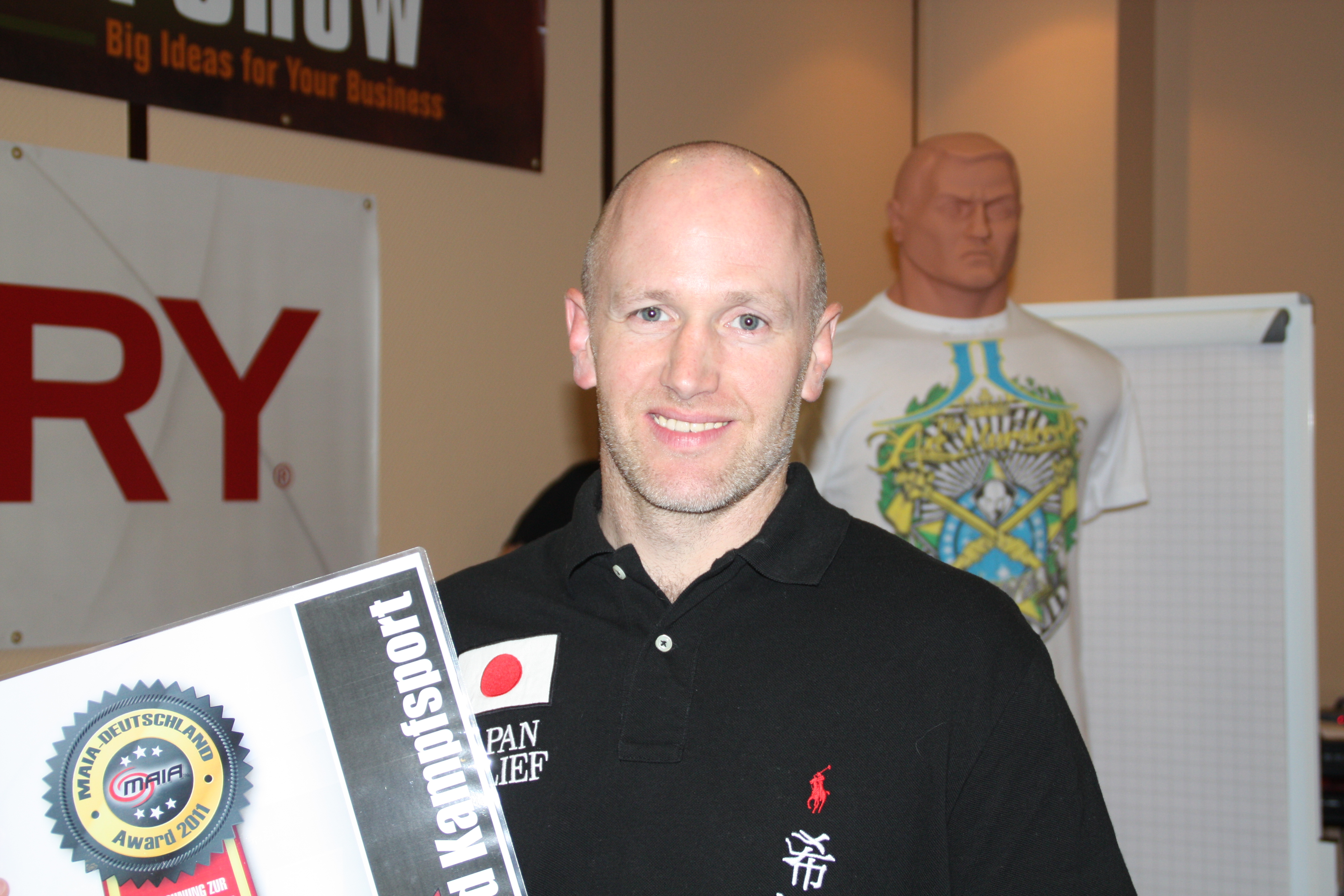 Andrè Mewis